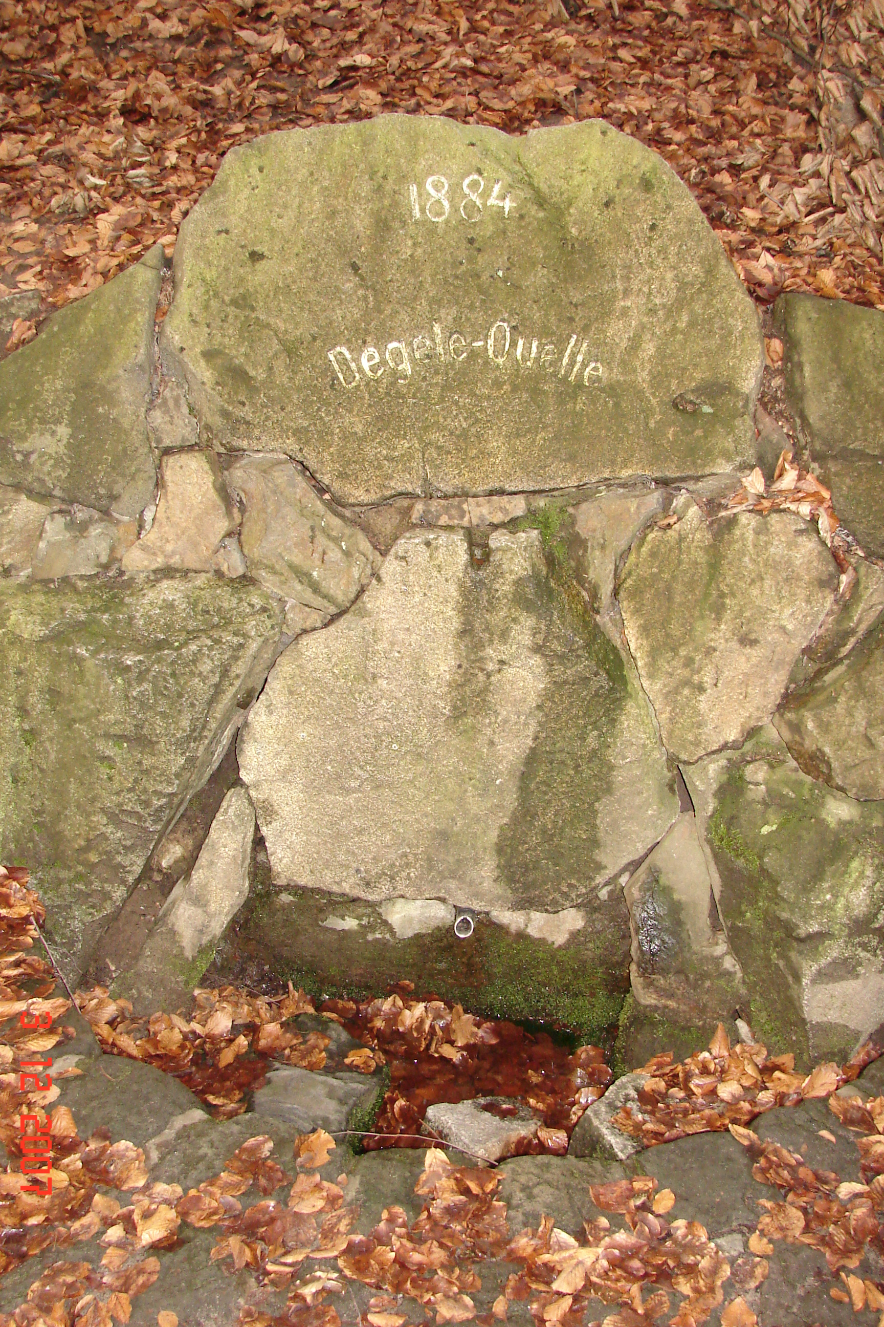 Degelequelle im Stechgrund, Dresdner Heide, Weißer Hirsch